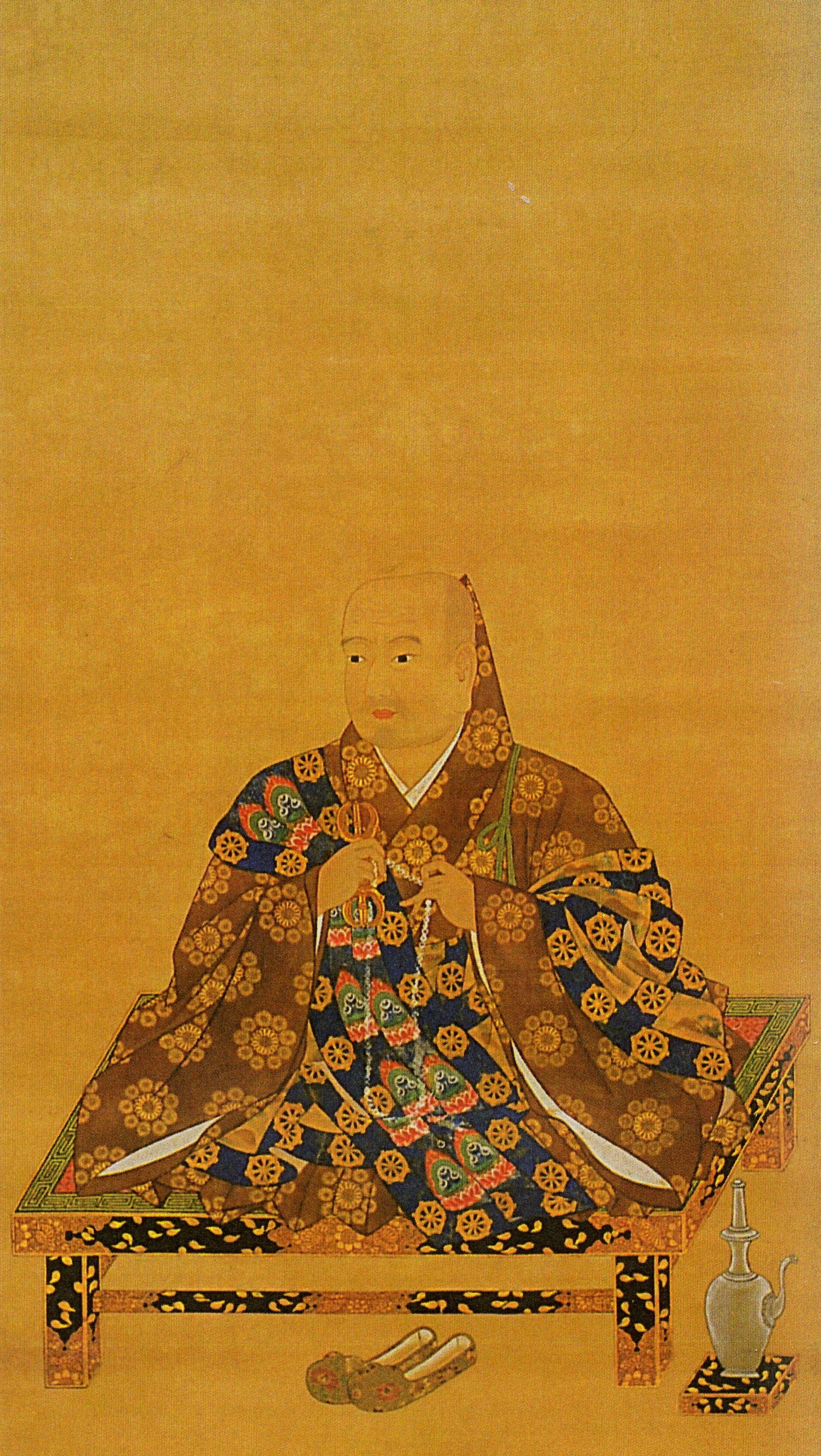 覚深入道親王の御画像。